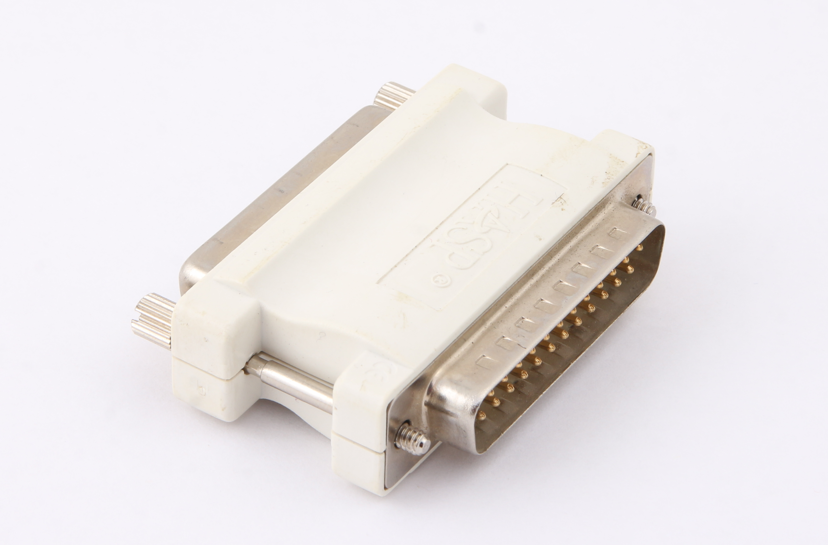 Ключ HASP на LPT порт для защиты программного обеспечения от копирования.